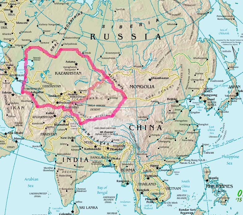 ユーラシア大陸全域におけるja:トルキスタンの位置。 CIAファクトブックより入手したもの編集